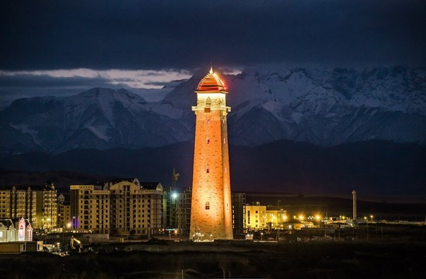 Ночной Магас